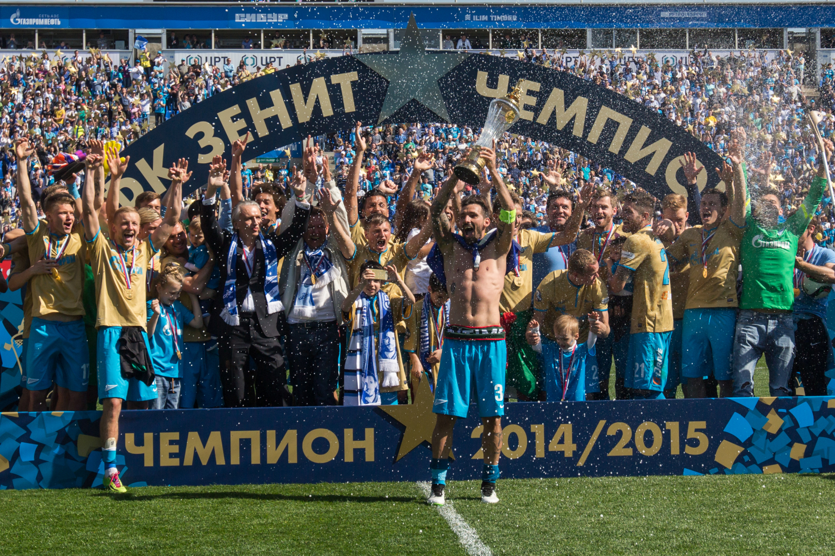 30.05.2015. Россия, Санкт-Петербург, стадион «Петровский». СОГАЗ-Чемпионат России 2014/2015, 30 тур, «Зенит» — «Локомотив». Церемония награждения команды «Зенит» золотыми медалями и кубком Чемпиона России.